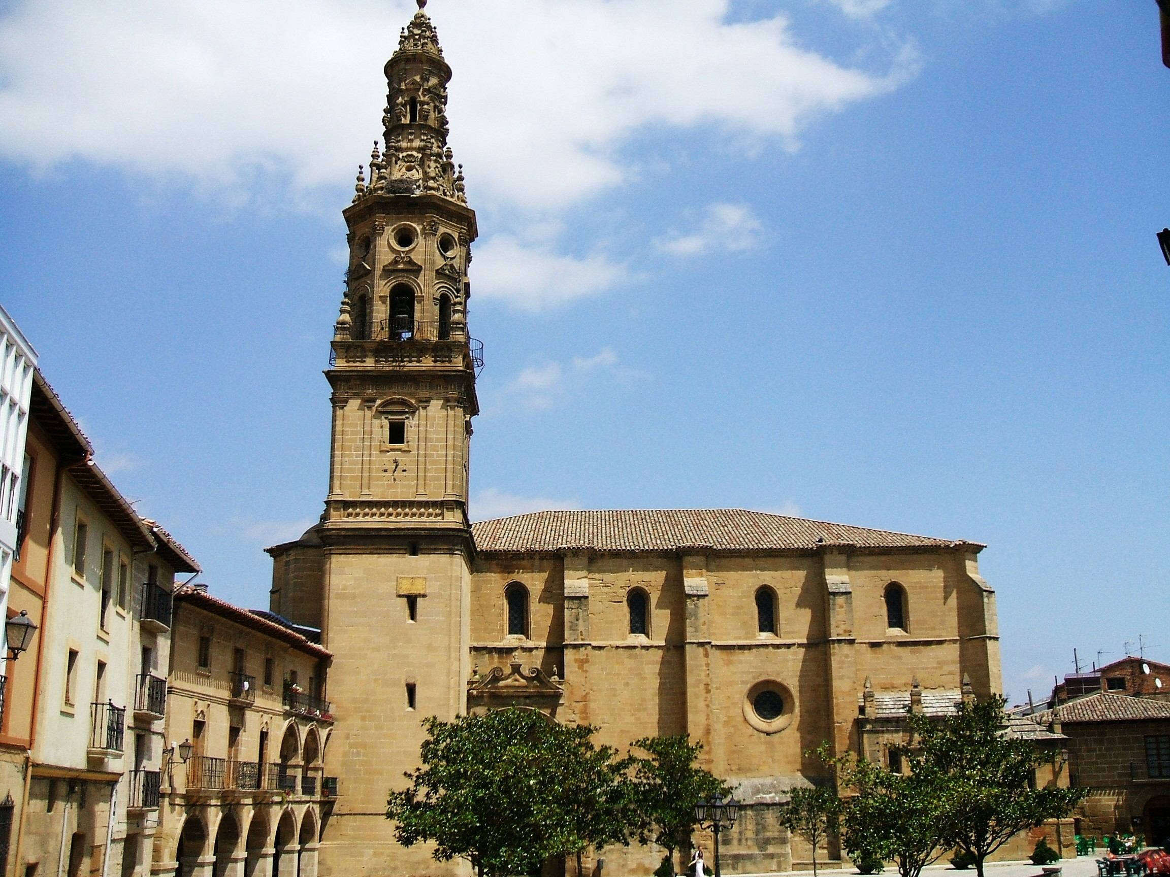 Iglesia de Nuestra Señora de la Asunción, Briones (La Rioja)